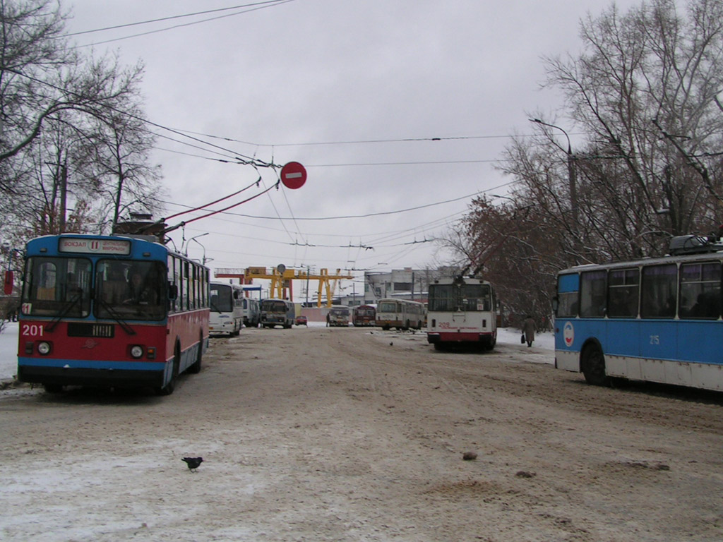 Конечная Вокзал. Йошкар-Ола.